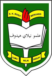 Lencana Sekolah